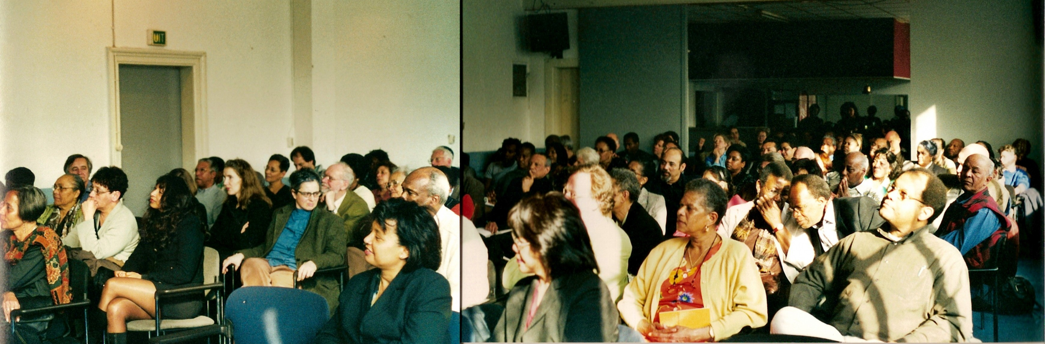 Een druk bezochte bijeenkomst van de Vereniging Ons Suriname in Amsterdam, juni 2000.